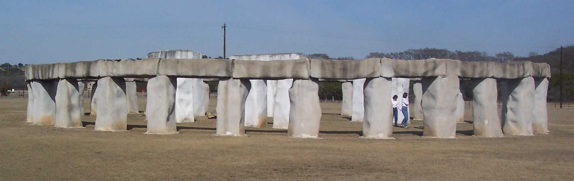 Stonehenge II, Texas, vue generale du site.